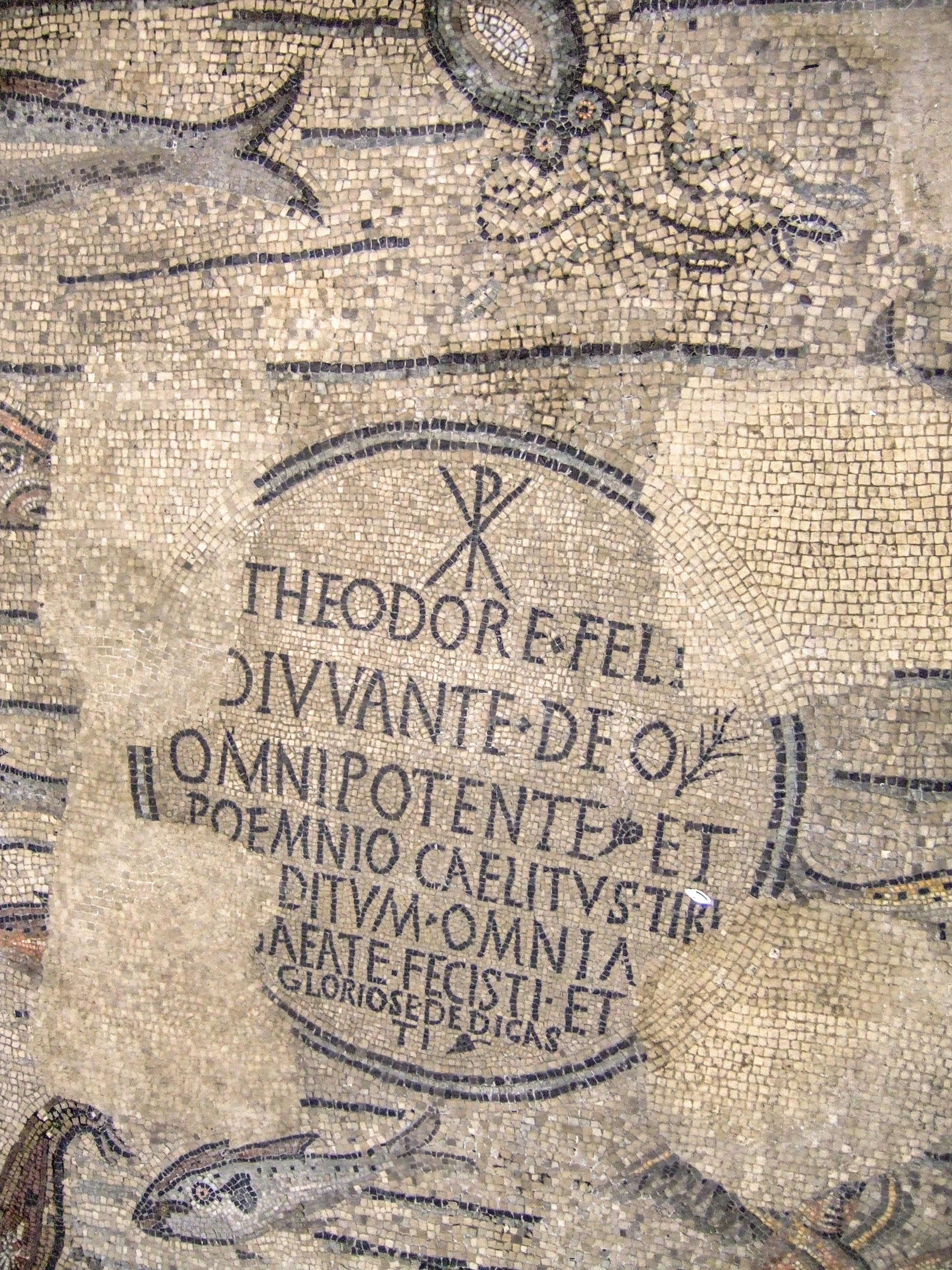 Basilica patriarcale di Aquileia - Mosaici - Dedica al vescovo Teodoro